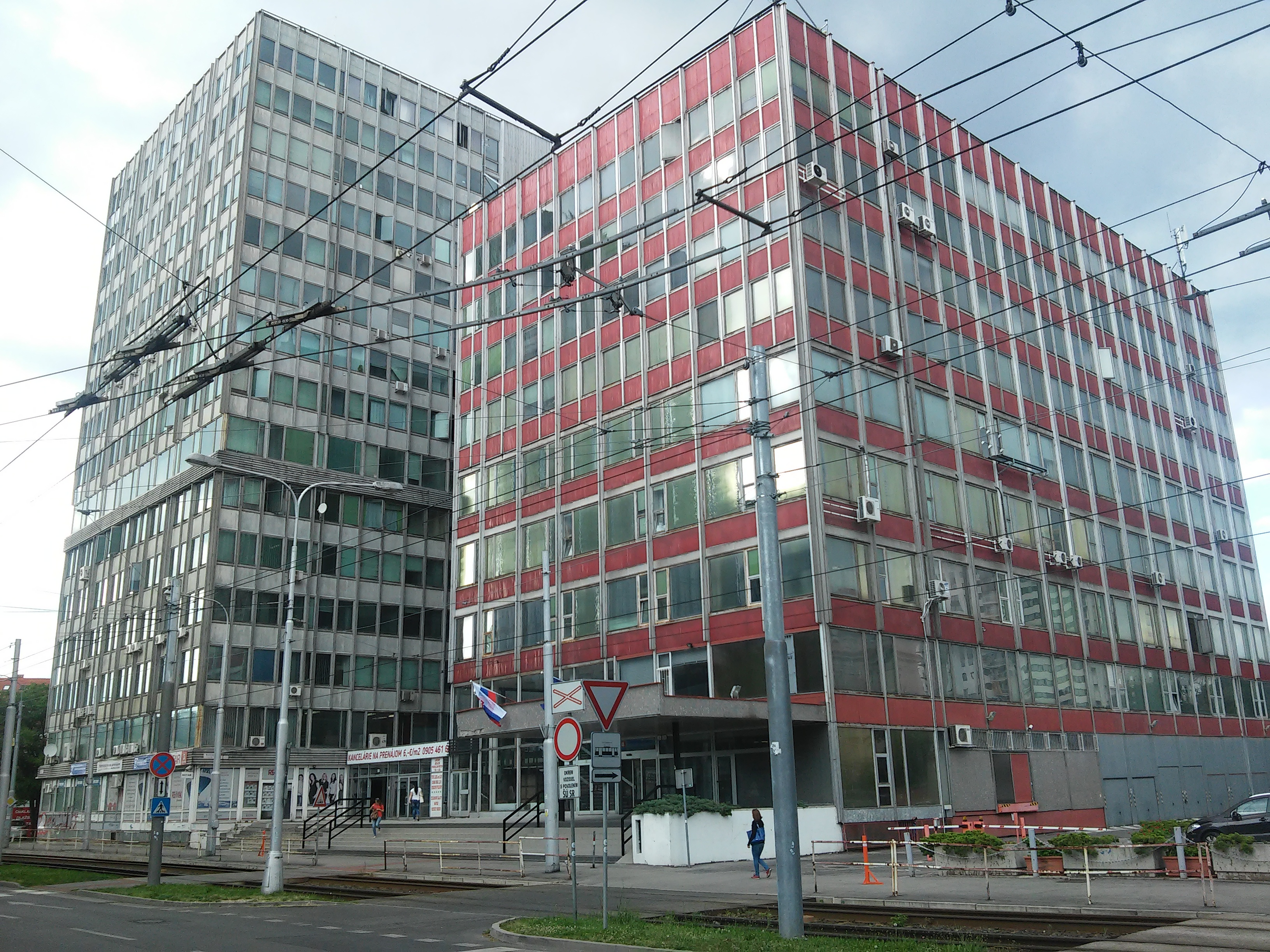 Štatistický úrad, Miletičova 3, Ružinov, Bratislava